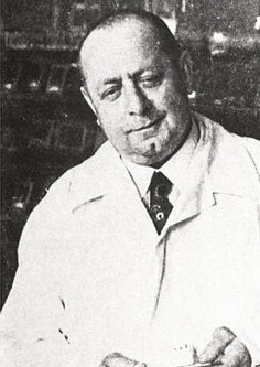 profesorem stomatologie Jan Jesenský